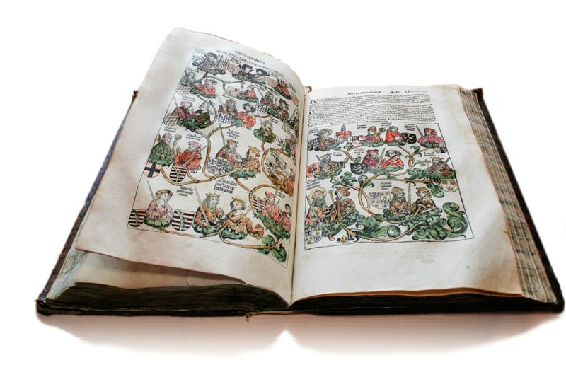 Шедель